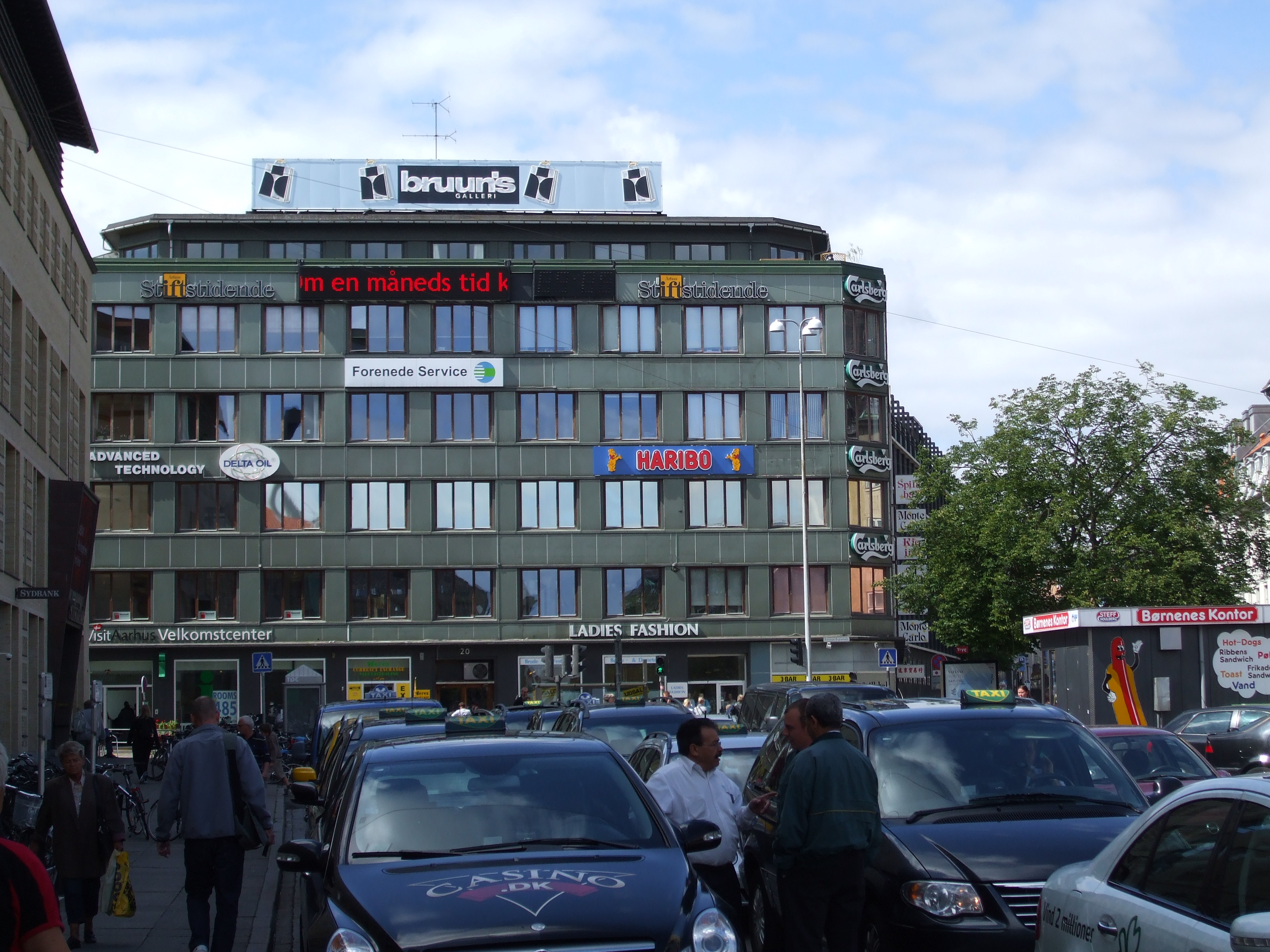 Taxiholdepladser på Banegårdspladsen, Århus